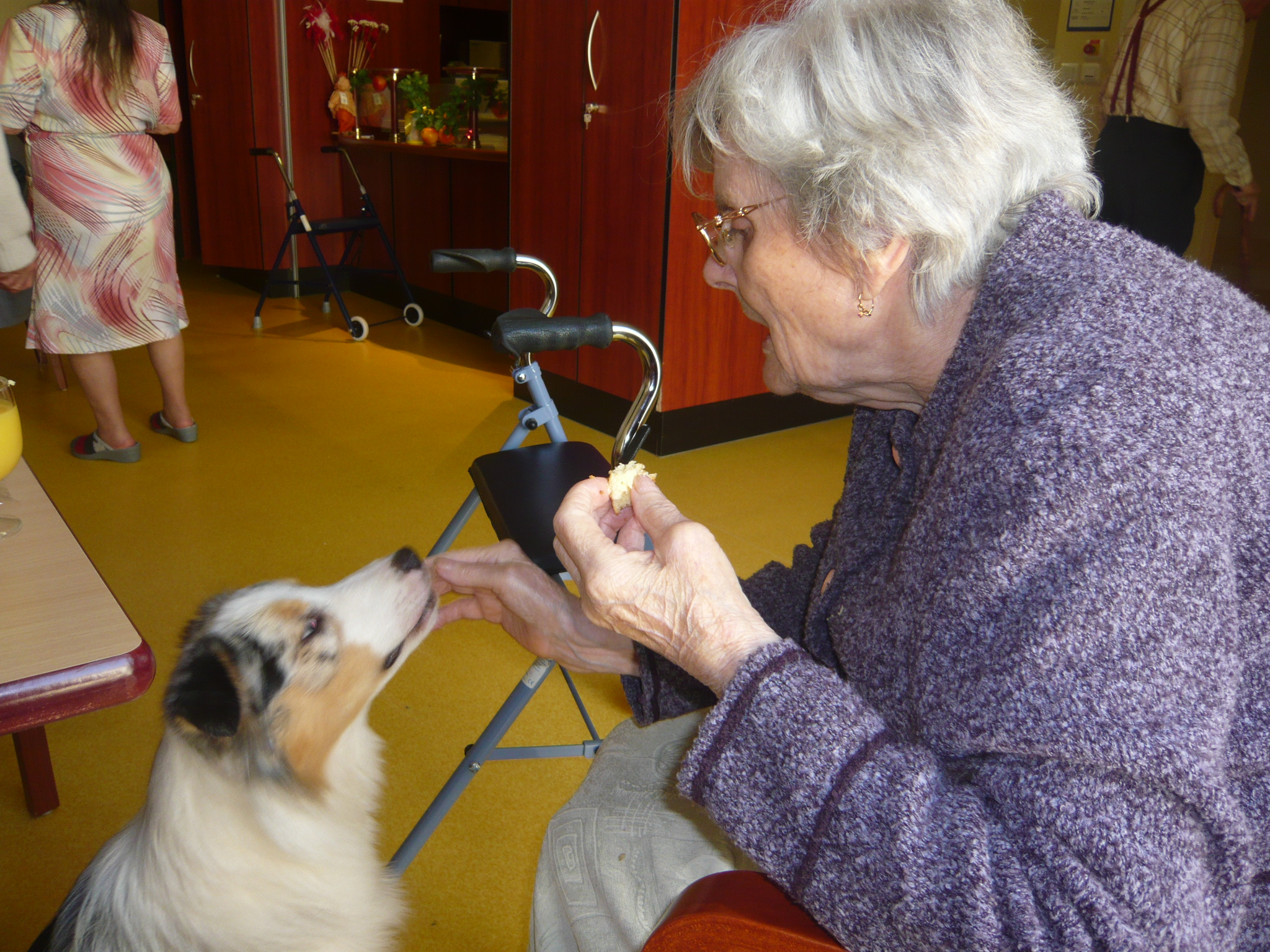 Photo d'une patiente en séance de cynothérapie auprès d'un chien médiateur.